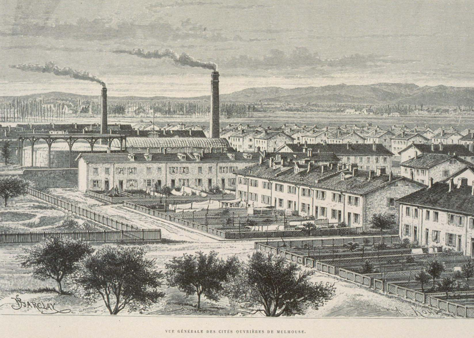 Vue générale des cités ouvrières de Mulhouse, de Barclay, Armand Kohl